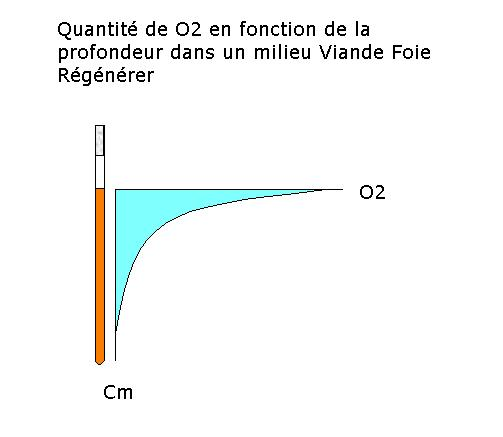 creer par alpha.prim le 17/08/2006